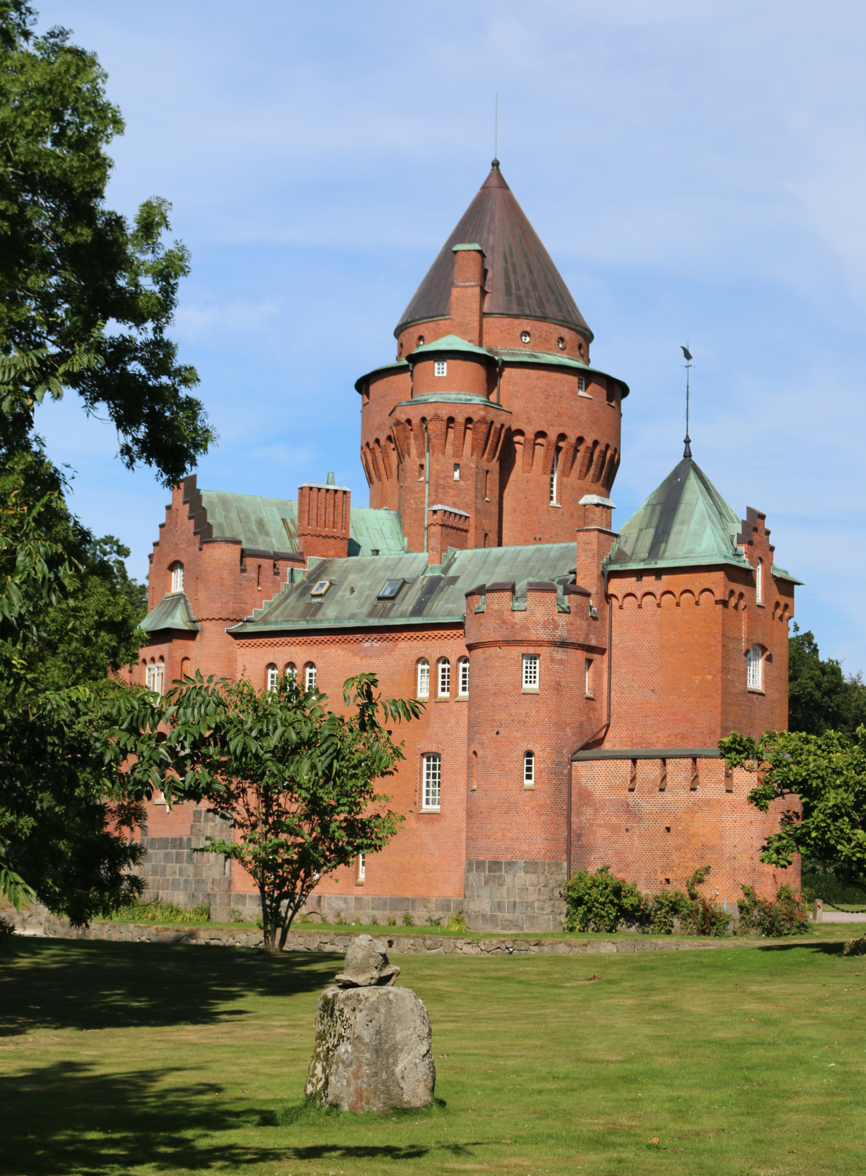 Hjularöds slott augusti 2015